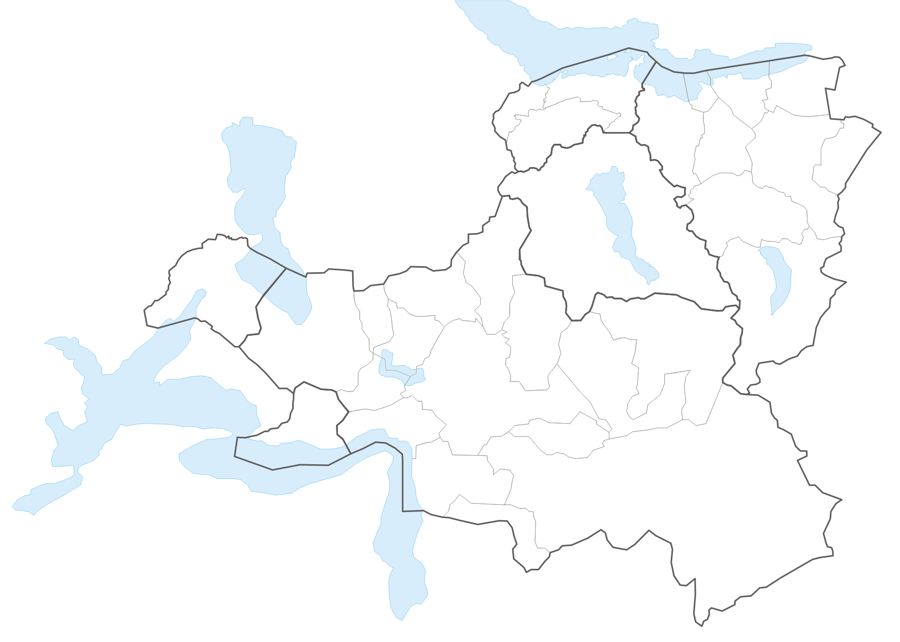 Municipalities in Canton Schwyz / Gemeinden des Kantons Schwyz